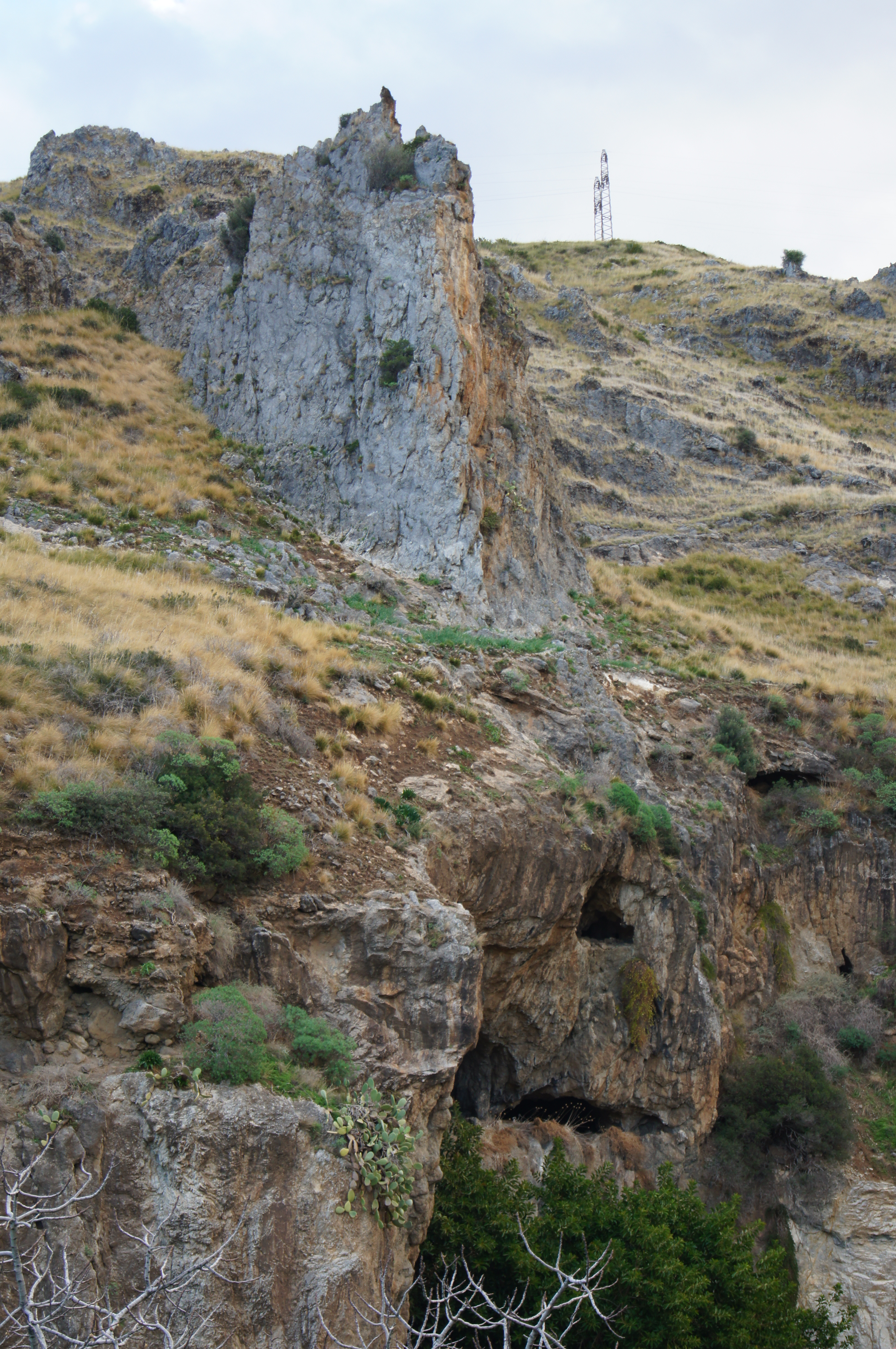 la Grotta du Scuru di Coreca con il Salto da Zita